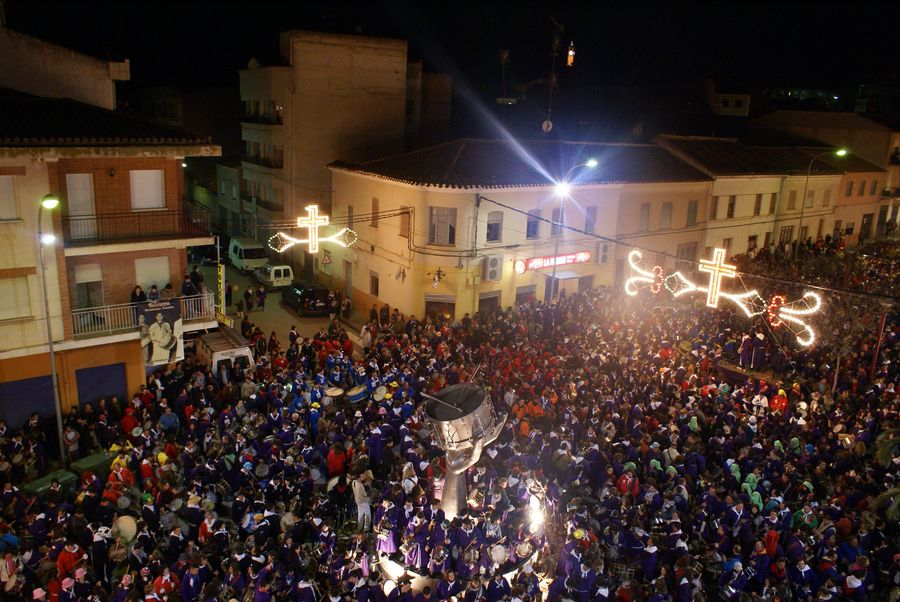 Tamborada de Tobarra (Cierre del Tambor 2007)